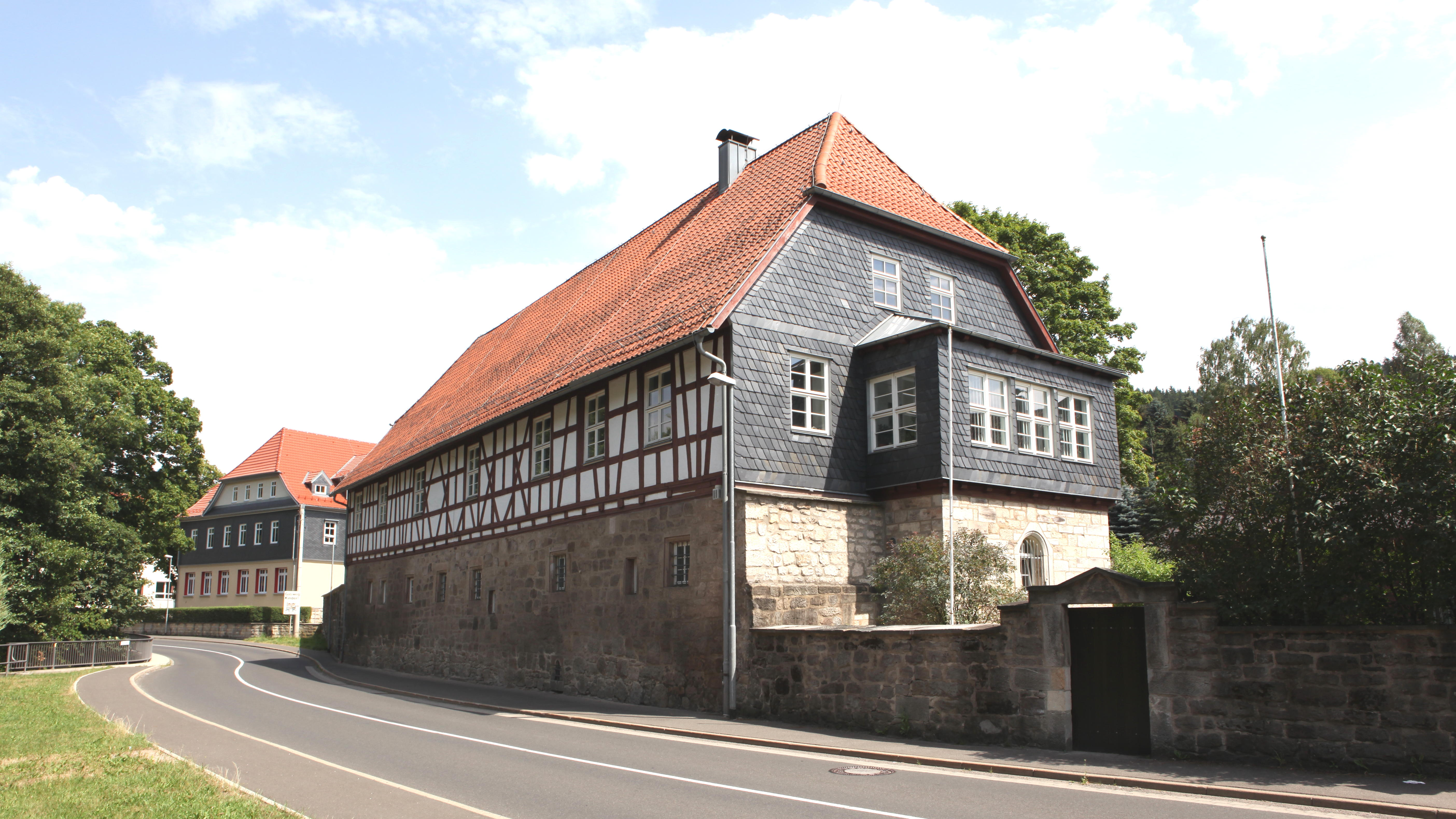 Fostamt Schönbrunn, ehm Jagdschloss Ernstthal, Gemeinde Schleusegrund